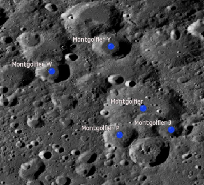 Cráter lunar Montgolfier. Cráteres satélite. (Imagen LRO)